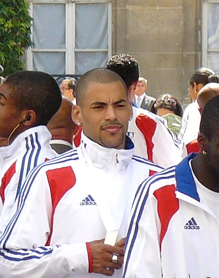 Garfield Darien, athlète français (110 m haies), lors de la réception à l'Élysée des médaillés de Barcelone , le 3 août 2010.